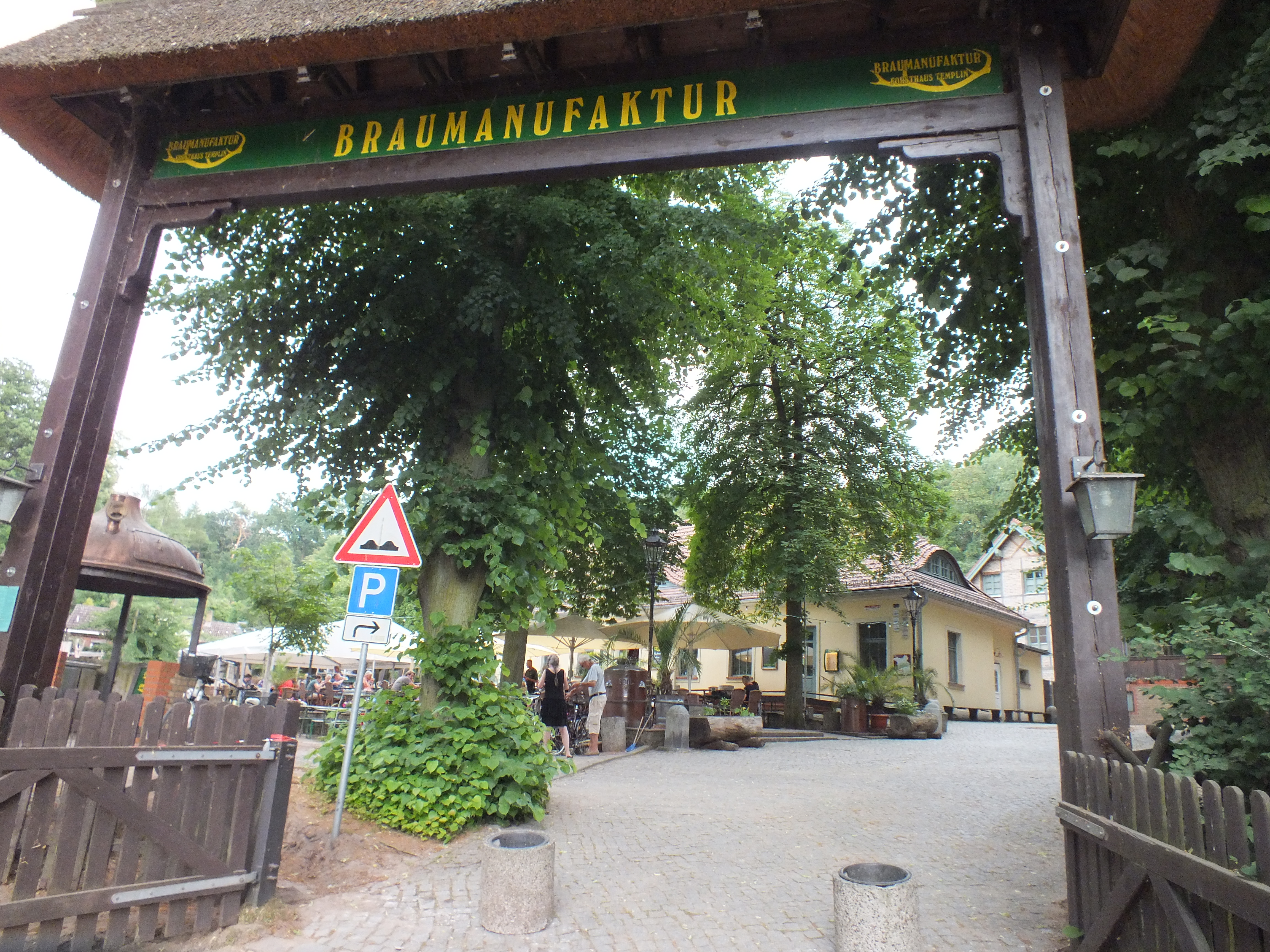 Brauereimanufaktur ‚Forsthaus Templin’, Eingangstor